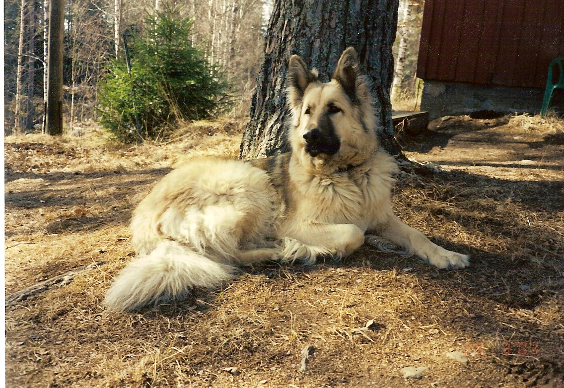 Kuva sekarotuisesta koirasta.